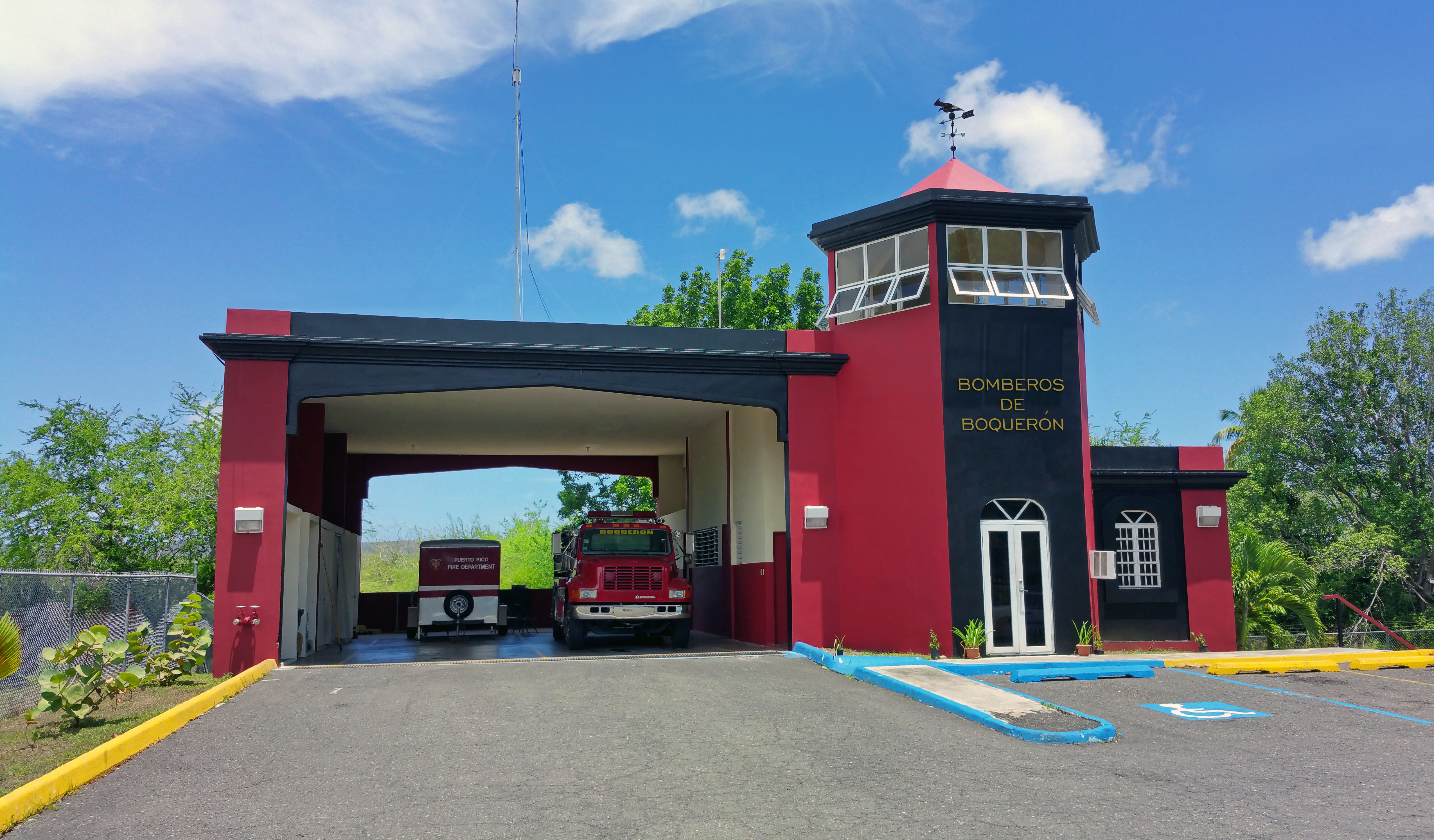 Estación de Bomberos del Poblado Boquerón, Cabo Rojo